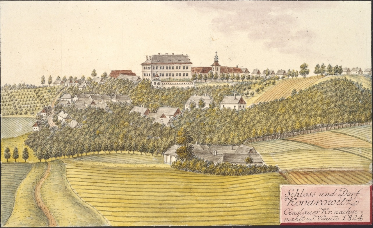 Zámek Konárovice. Schloss und Dorf Konarowitz, Czaslauer Kr. nachgemahlt v. J. Venuto 1824